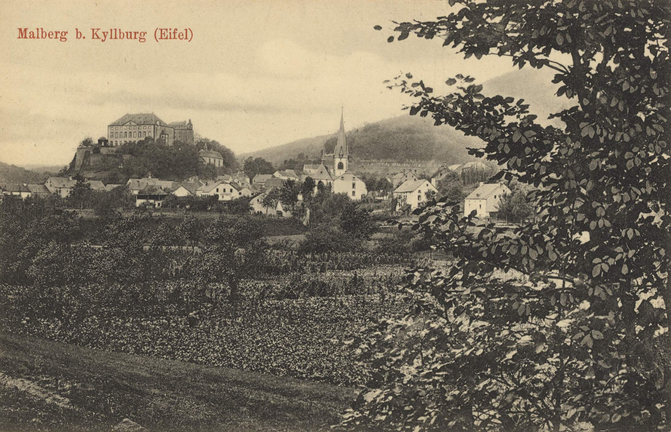 Stadtansicht